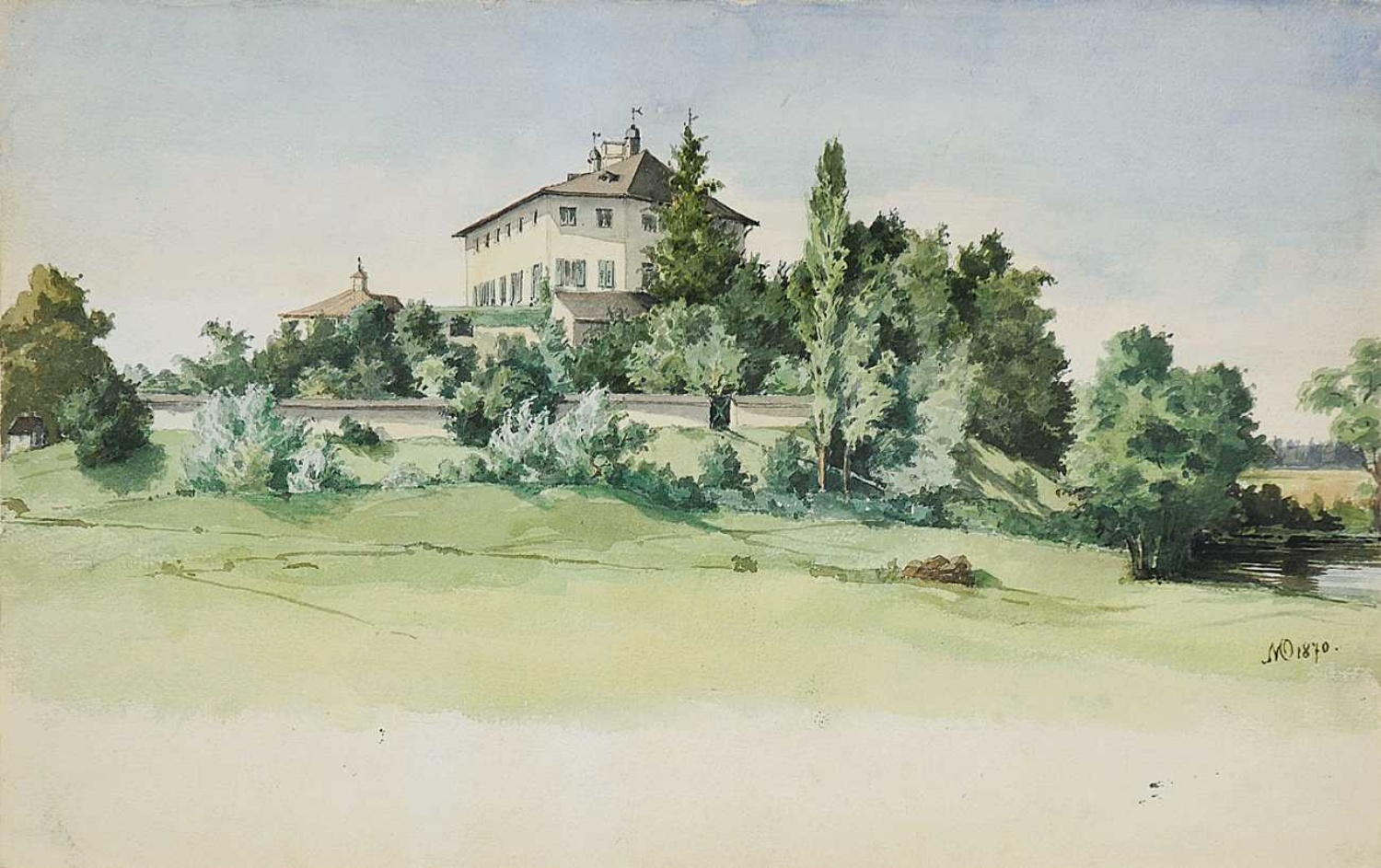 Schloss Wiesenfelden (Lkr. Straubing-Bogen), Aquarell, 29 x 46 cm, datiert 1870